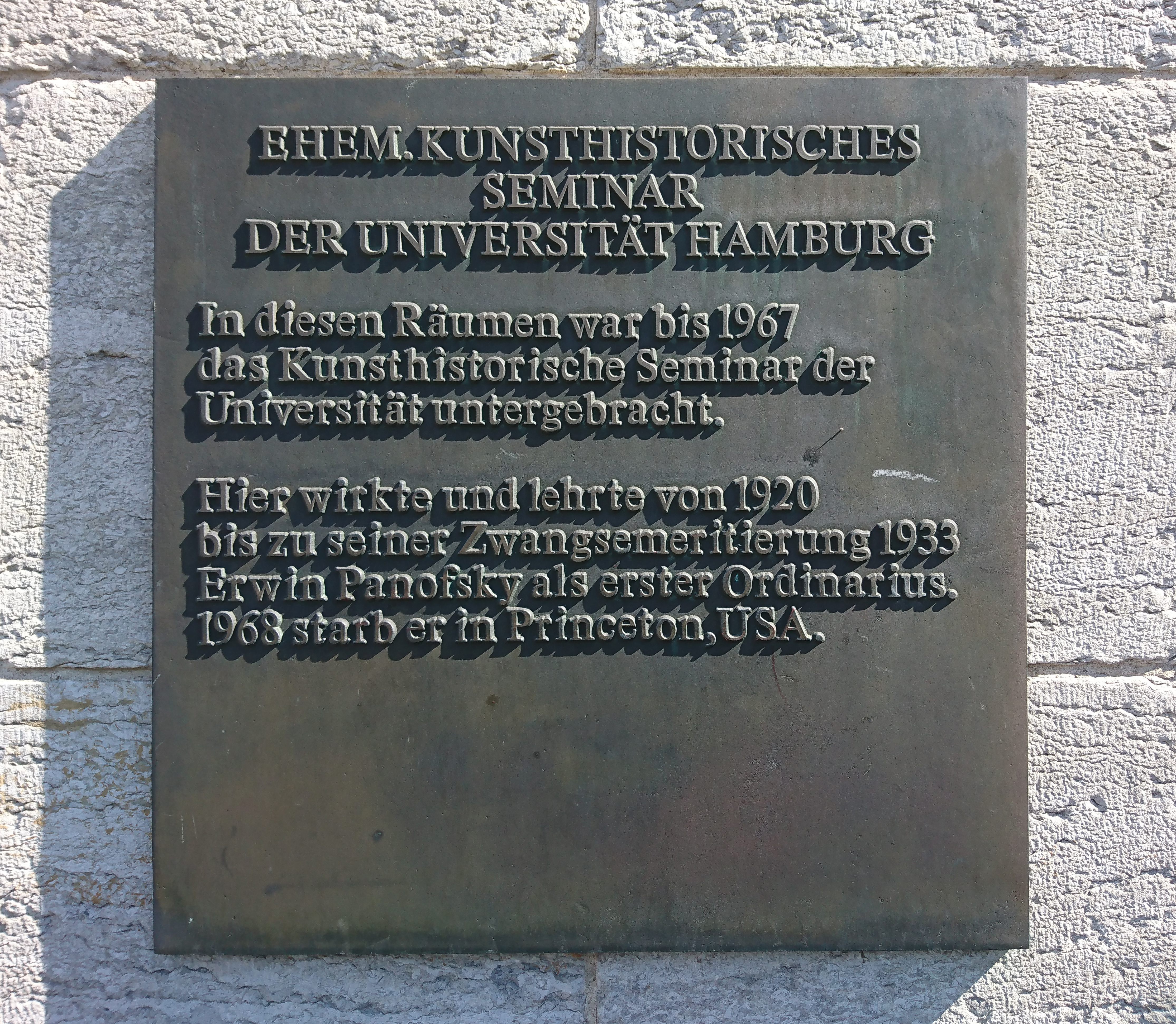 Tafel am Erweiterungsbau der Hamburger Kunsthalle in Hamburg-Altstadt